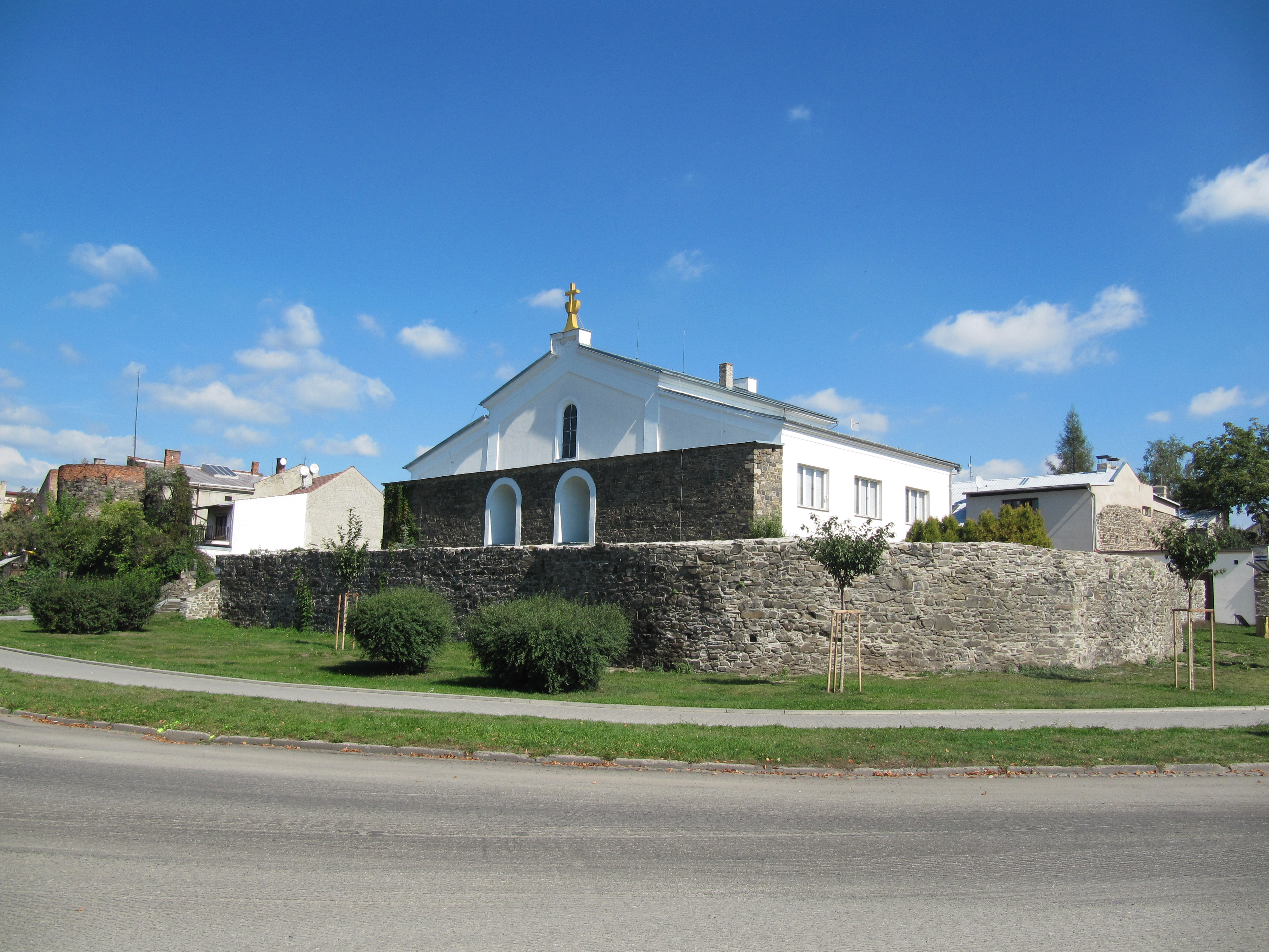 Synagoga - bývalá (Lipník nad Bečvou), Perštýnská, Lipník nad Bečvou